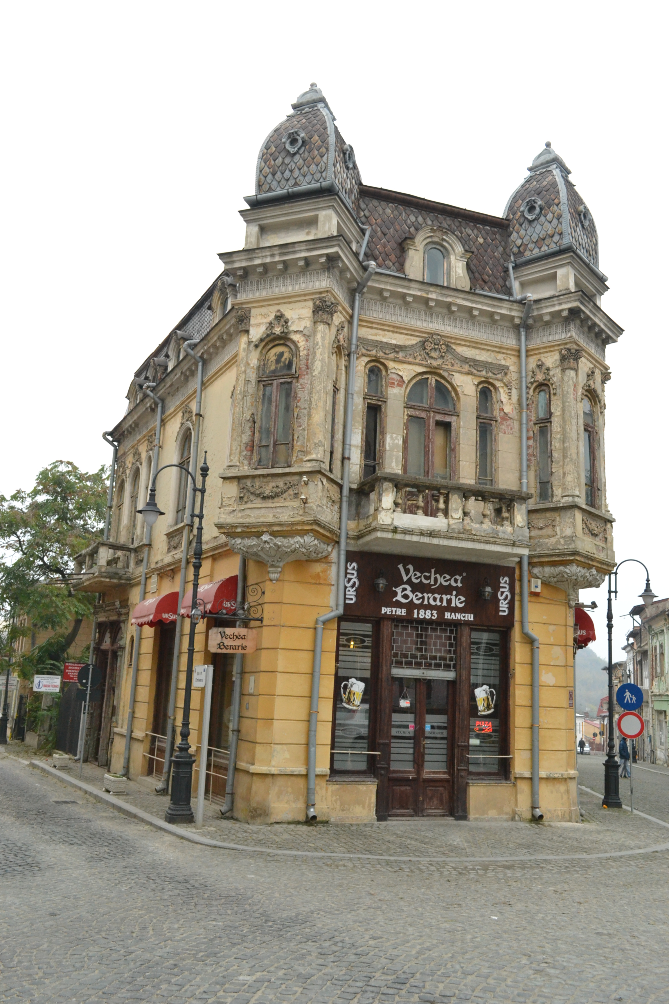 Grand Hotel Regal din Slatina în 2014. Situat in trecut pe fostra strada Bucuresti din Slatina.